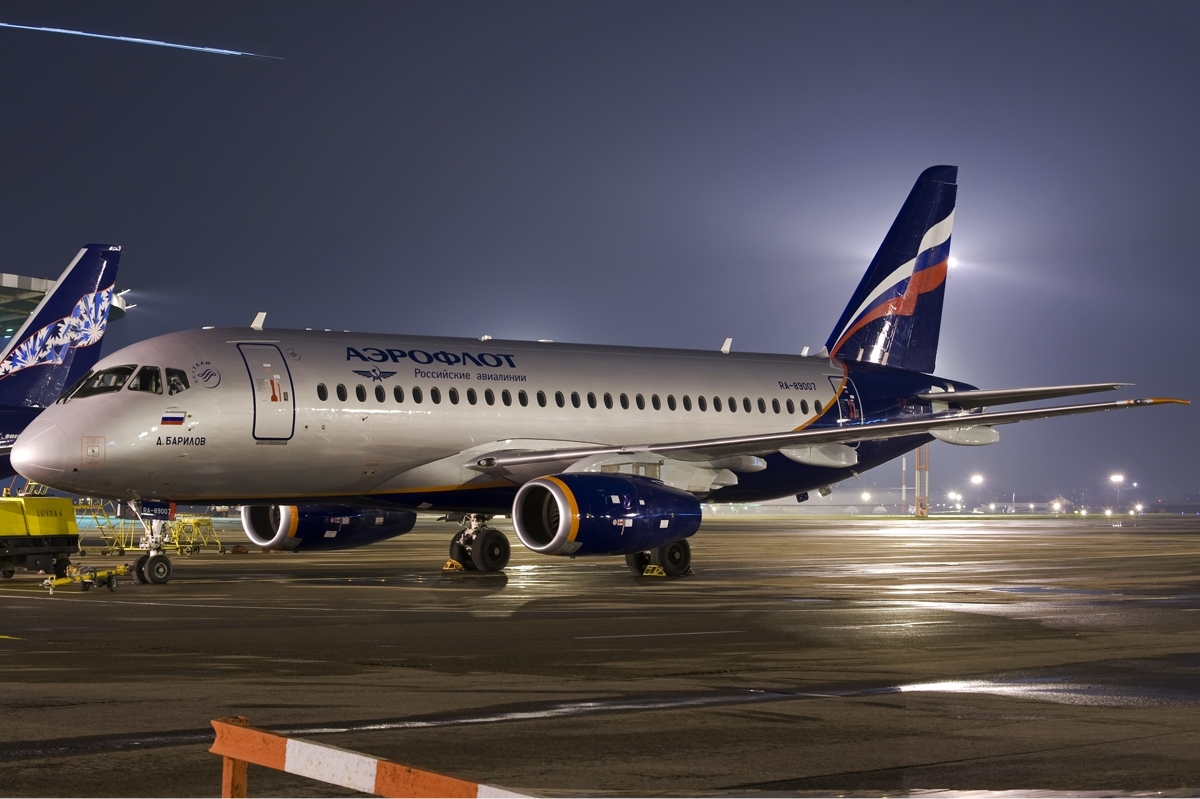 Aeroflot Sukhoi Superjet